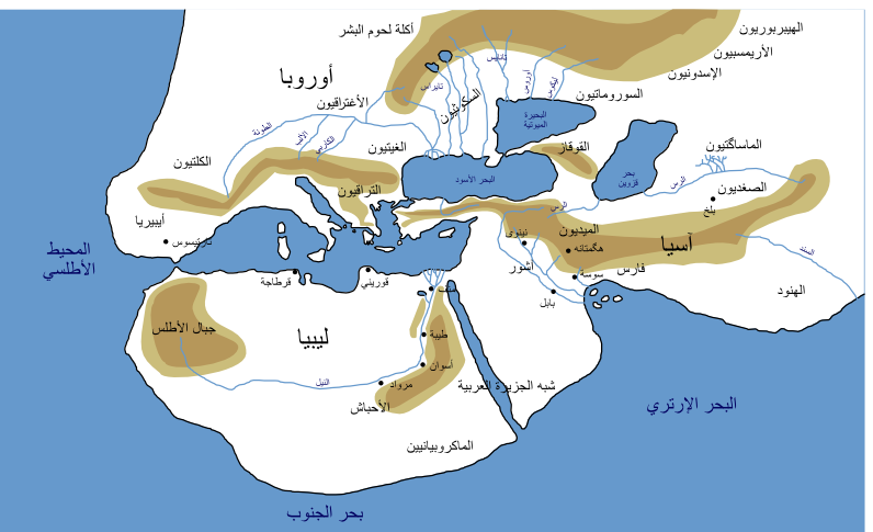 خارطة العالم كما يُحتمل أن تصوره هيرودوت خلال القرن الخامس ق.م..